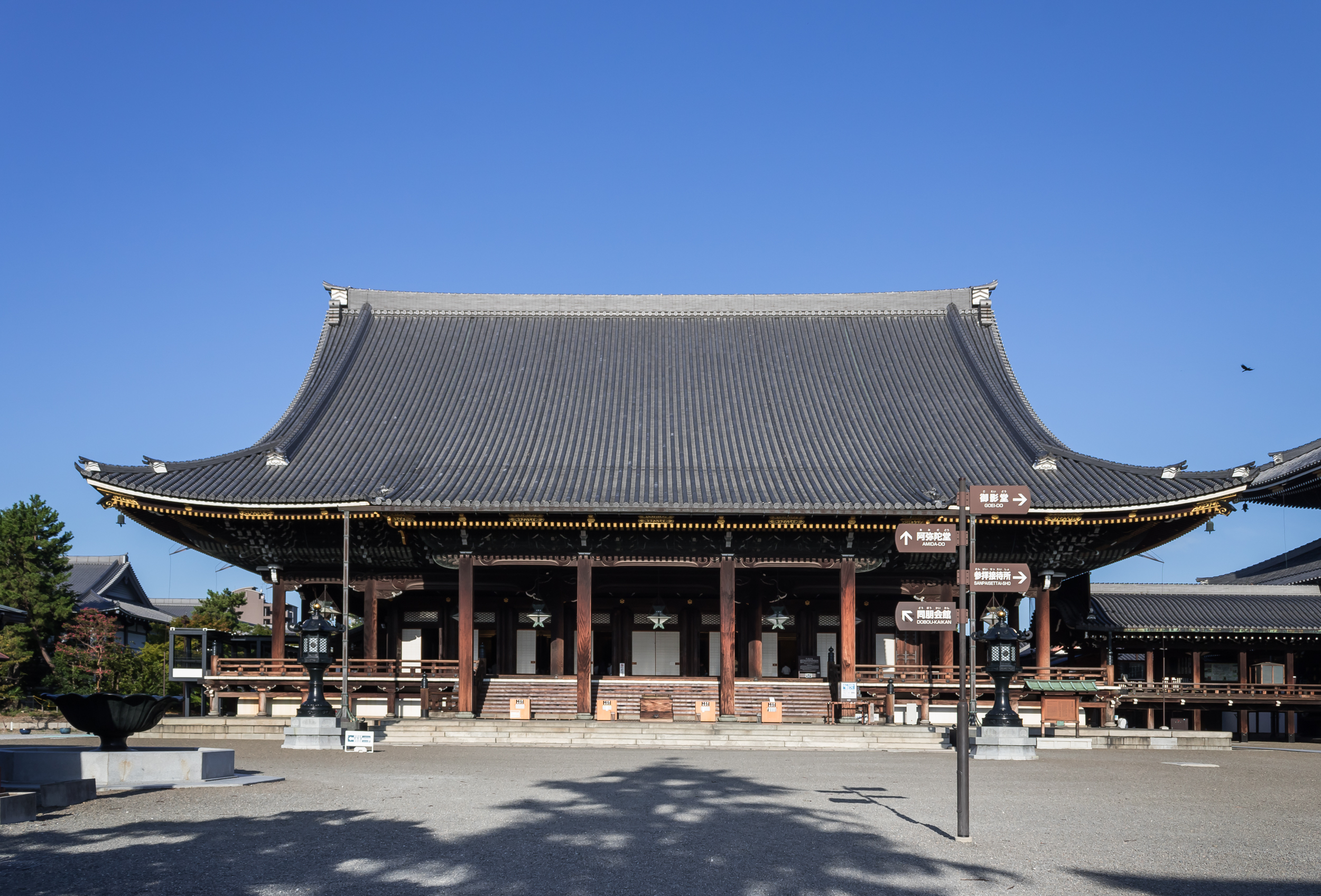 東本願寺、阿弥陀堂。